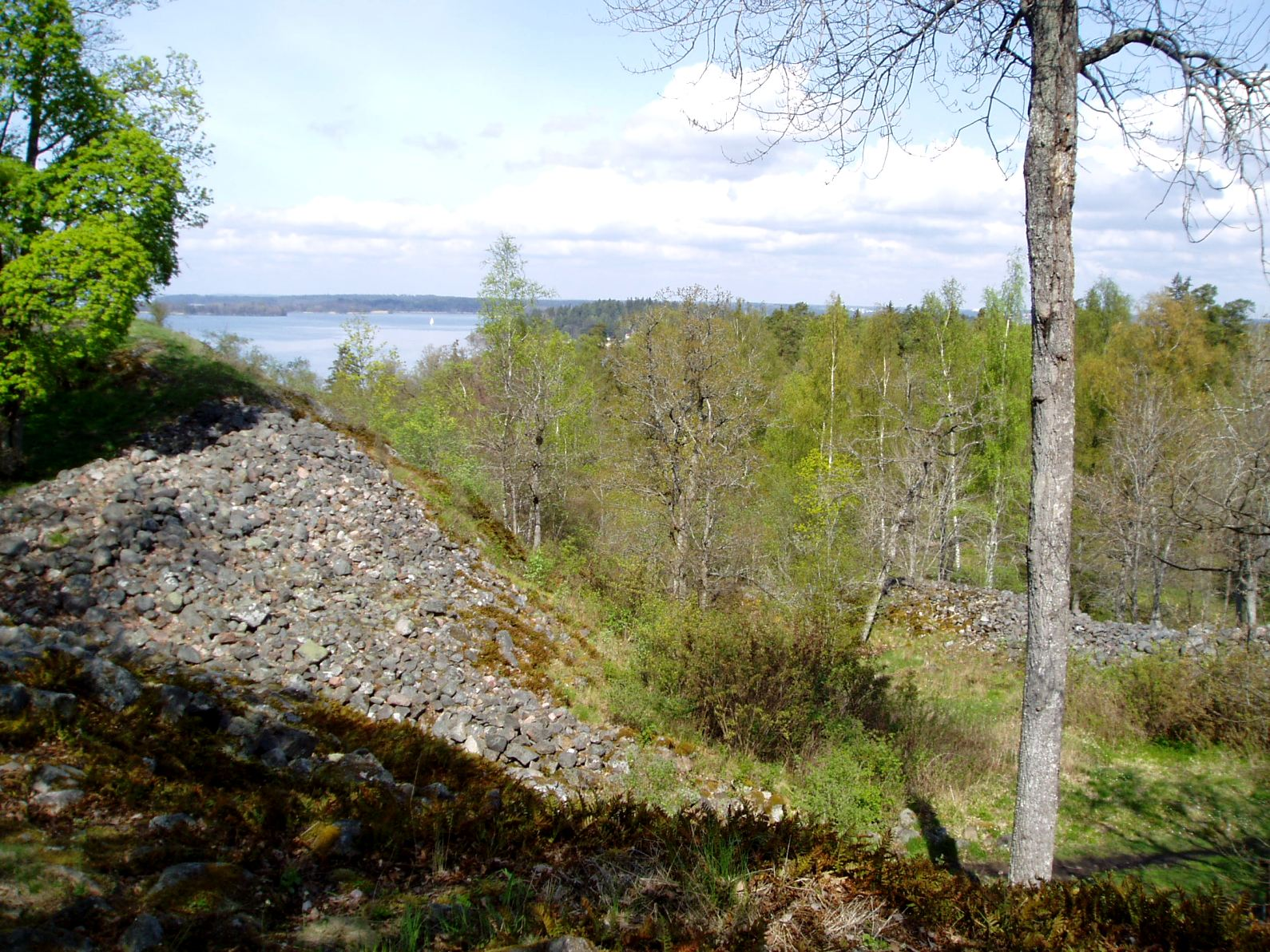 Gåseborg fornborg, hill fort, Järfälla municipality, Sweden